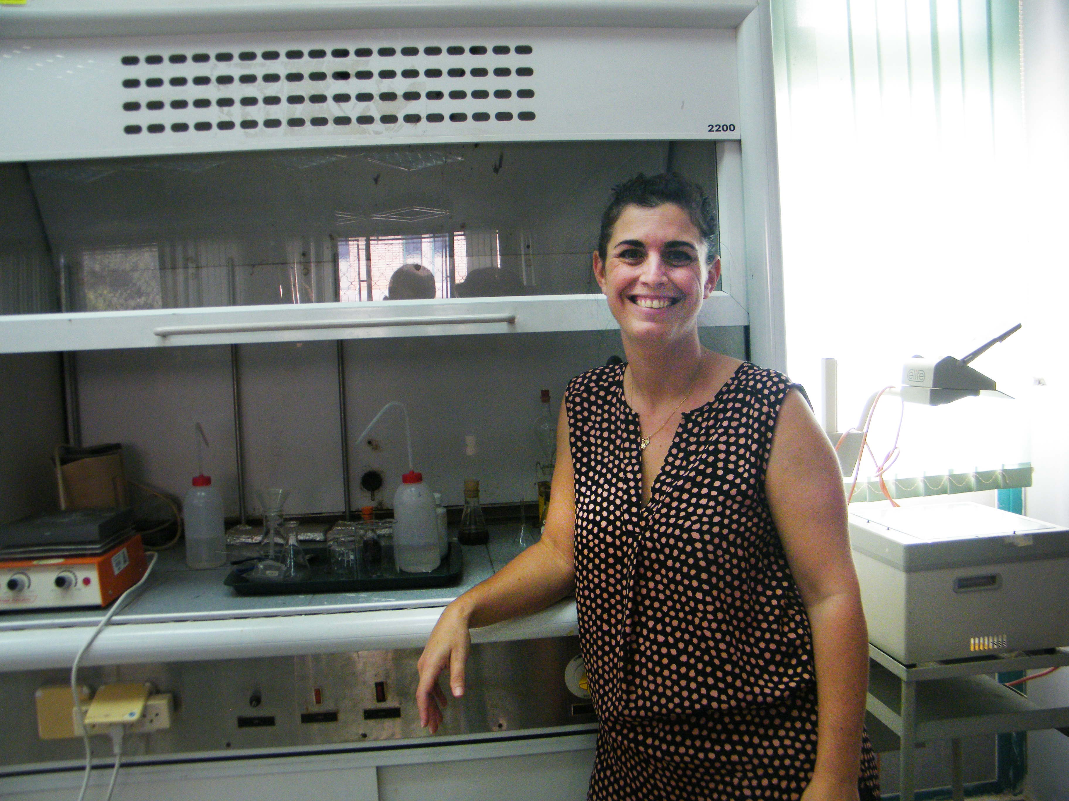 קרן מנדה פרץ צילום אופק בן יהושע תיכון רוטברג